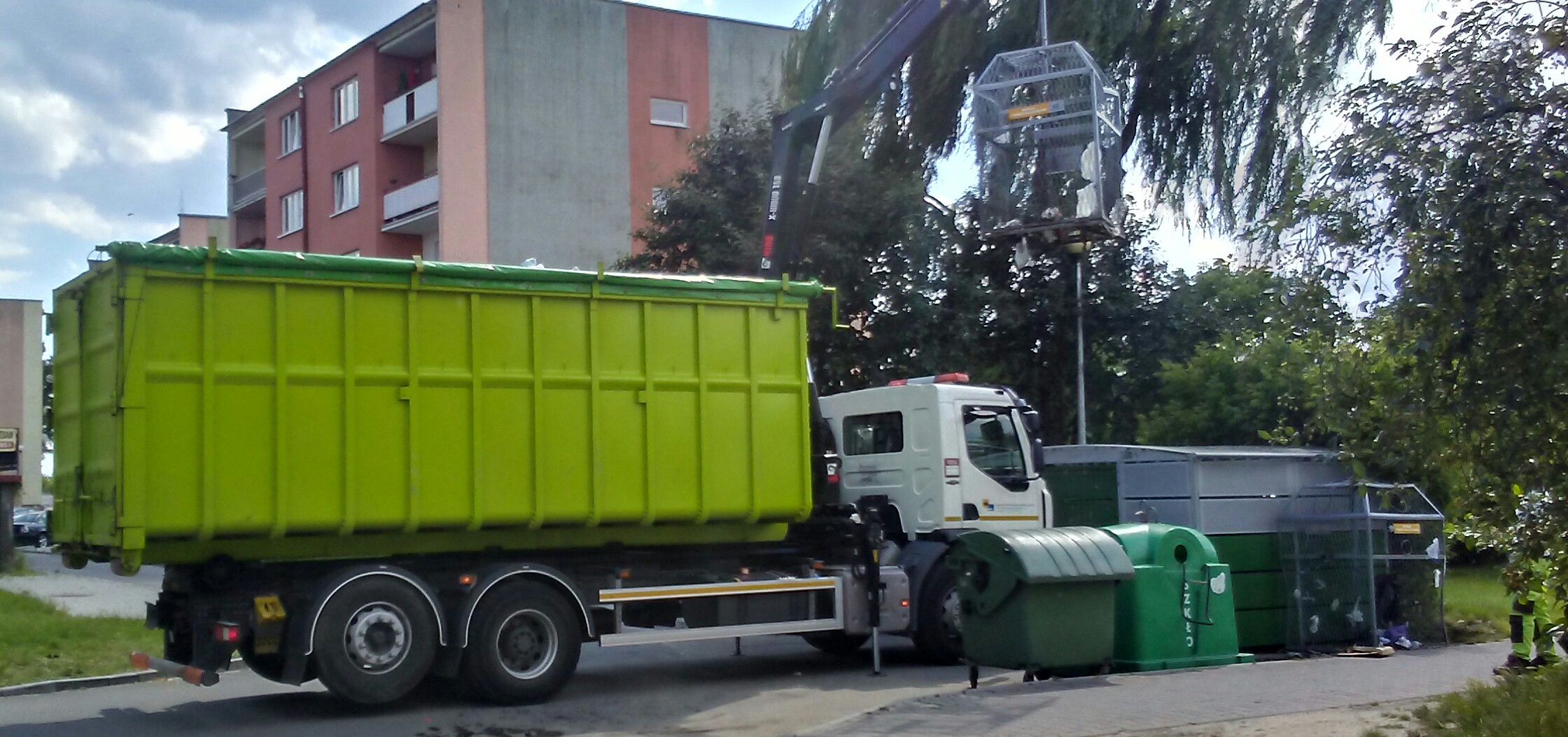 Wywóz śmieci, osiedle Niebrów, Tomaszów Mazowiecki